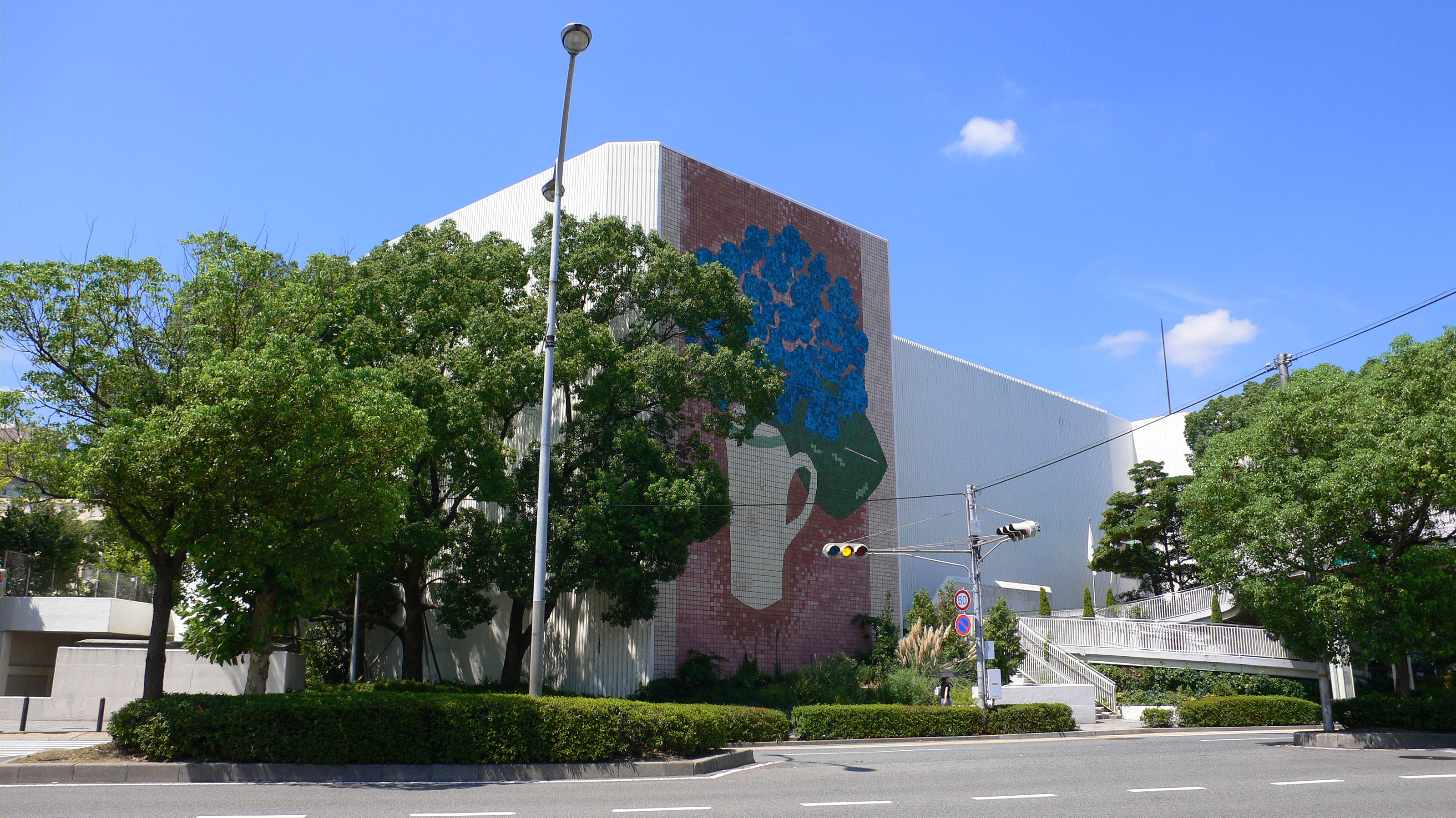 Kobe Bunka Hall in Kobe, Hyogo, Japan